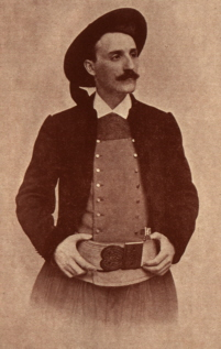 Scan de document personnel